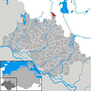 Wittenförden in Mecklenburg-Vorpommern - district Ludwigslust